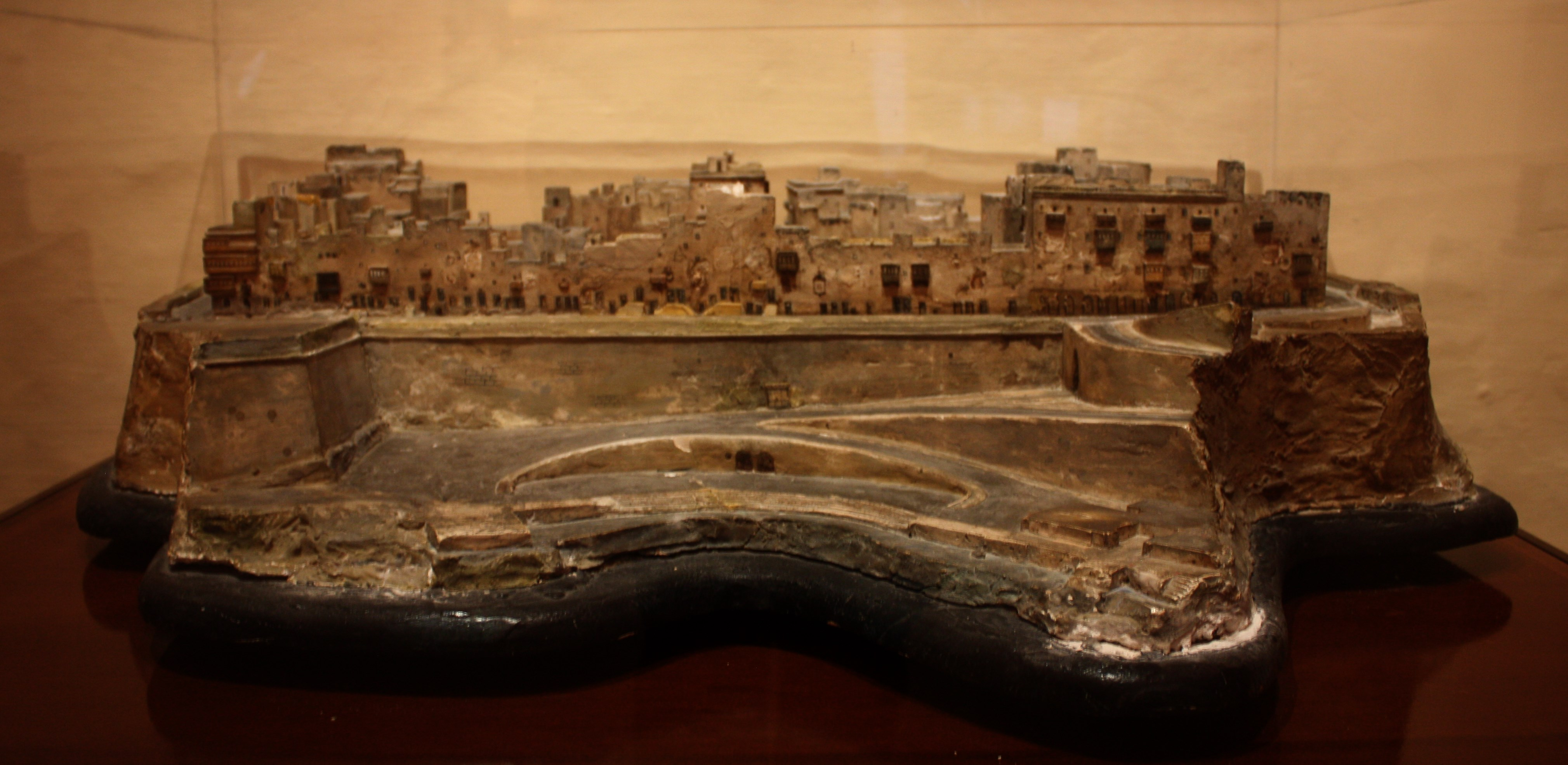 Malti: Mudell tal-Mandraġġ li jinsab fil-Mużew tal-Inkwiżitur